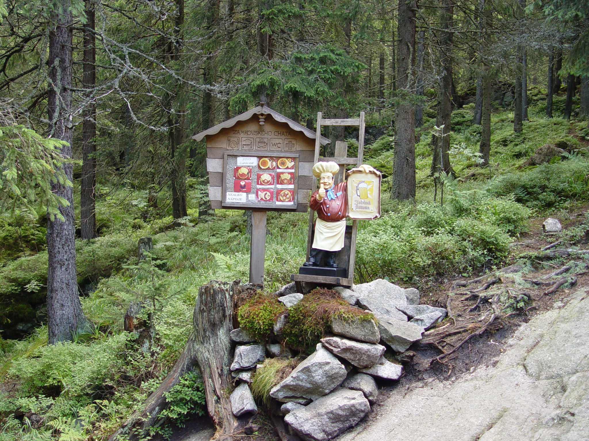 Magas-Tátra_Zamkovsky_menedékház_étlapja